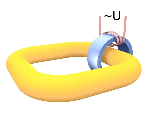 Устройство индукционной лампы